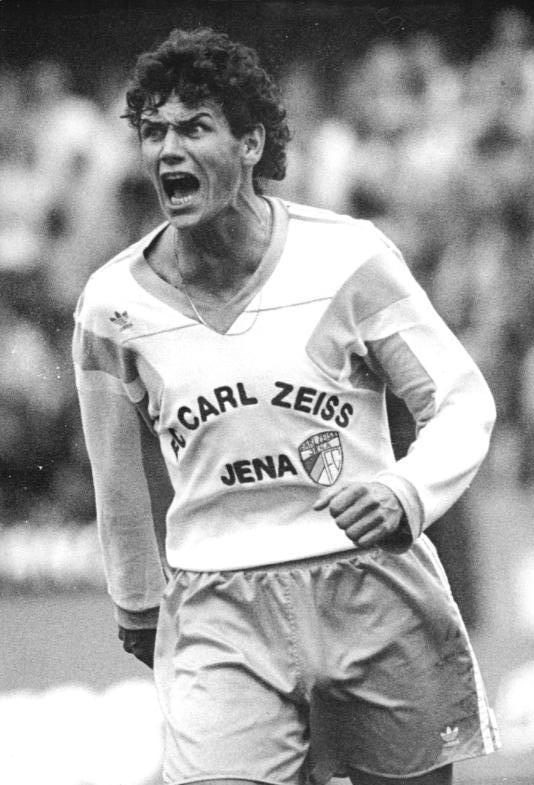 ADN- Jan-Peter Kasper-6.9.90- Jena: Fußball-Oberliga: FC Carl Zeiss Jena - FC Lok Leipzig 3:1 (1:0) Libero Heiko Peschke moniert eine Entscheidung des Linienrichters. In der 11. Minute erzielte er das 1:0 für Jena durch ein Foulstrafstoß. Peschke wird vom 1. FC Köln umworben.